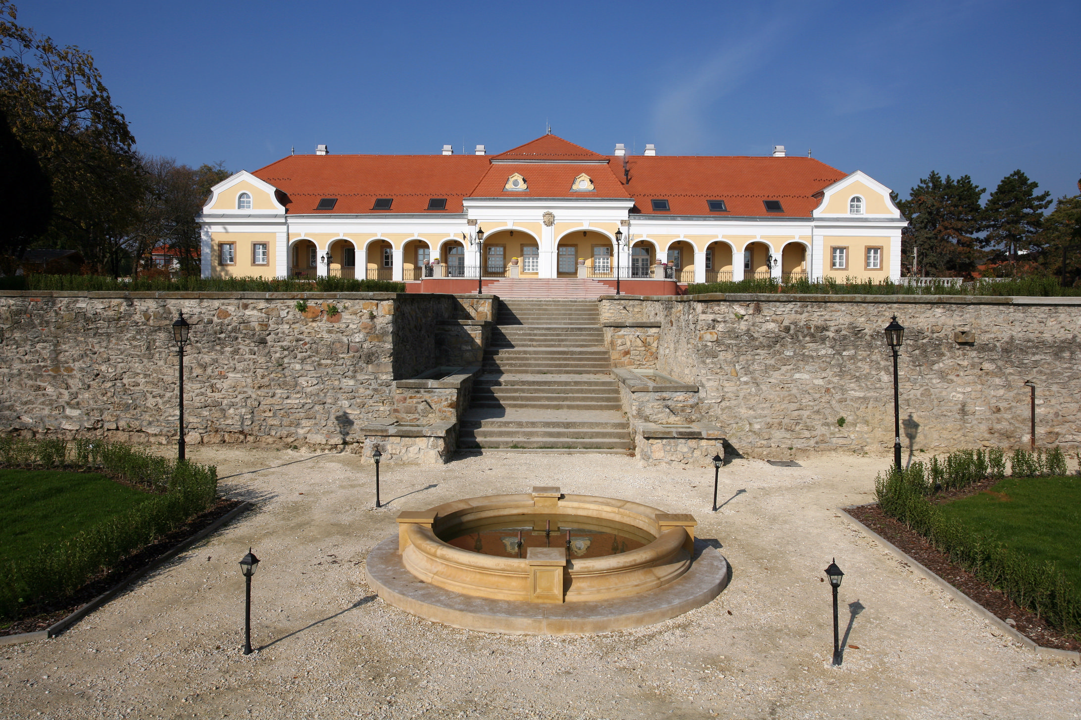 Magyar Kóruskastély